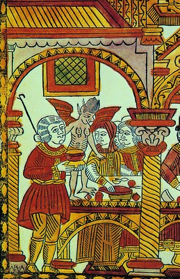 Трапеза нечестивих: Фрагмент